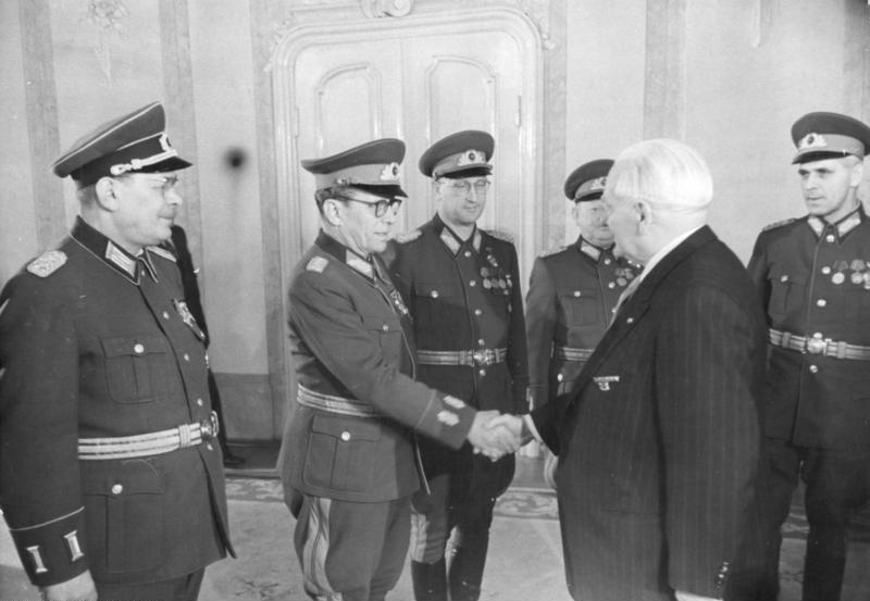 Zentralbild Heilig, 1.3.1957 Zum Jahrestag der Nationalen Volksarmee am 1. März 1957 Präsident Wilhelm Pieck empfing am Vormittag des 1. März 1957 in seinem Amtssitz in Berlin-Niederschönhausen den Minister für Nationale Verteidigung, Generaloberst Willi Stoph, sowie weitere Generäle und Offiziere. Generaloberst Stoph überbrachte den Dank der Nationalen Volksarmee für die Grußadresse des Präsidenten zum ersten Jahrestag. (Näheres siehe ADN-Meldung vom 1. März 1957) UBz: Präsident Wilhelm Pieck begrüßt die Mitglieder der Delegation. Hier Generalleutnant Vincenz Müller, daneben: Generalmajor Dickel und Generalmajor Muntschke, rechts: Minister Stoph.